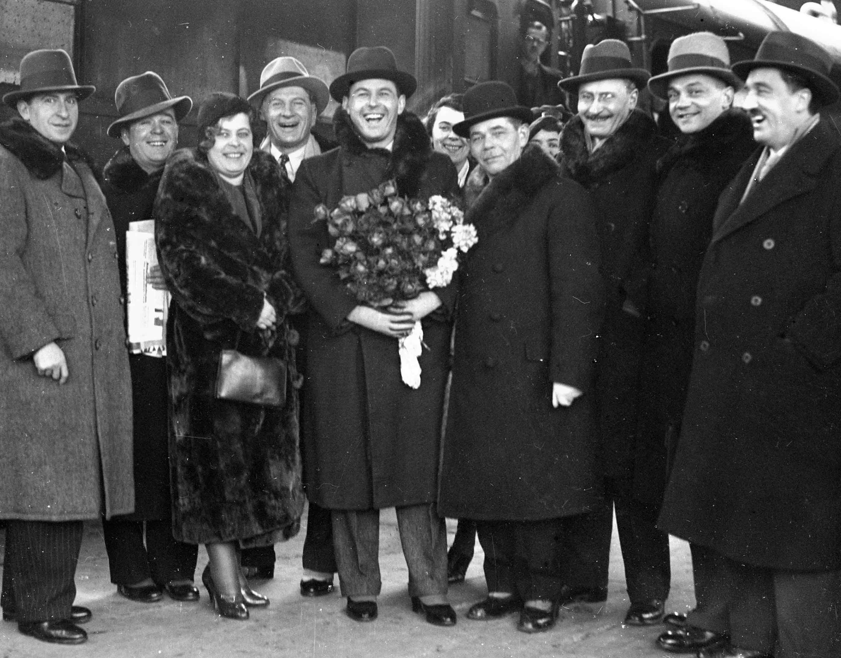 Pożegnanie śpiewaka Jana Kiepury (z kwiatami) na krakowskim dworcu kolejowym przez śpiewaka Adama Didura (4. z lewej) i sekretarz redakcji IKC Jadwigę Zbrożkówną (3. z lewej) w styczniu 1935, Narodowe Archiwum Cyfrowe, sygnatura 3/1/0/11/8238/7